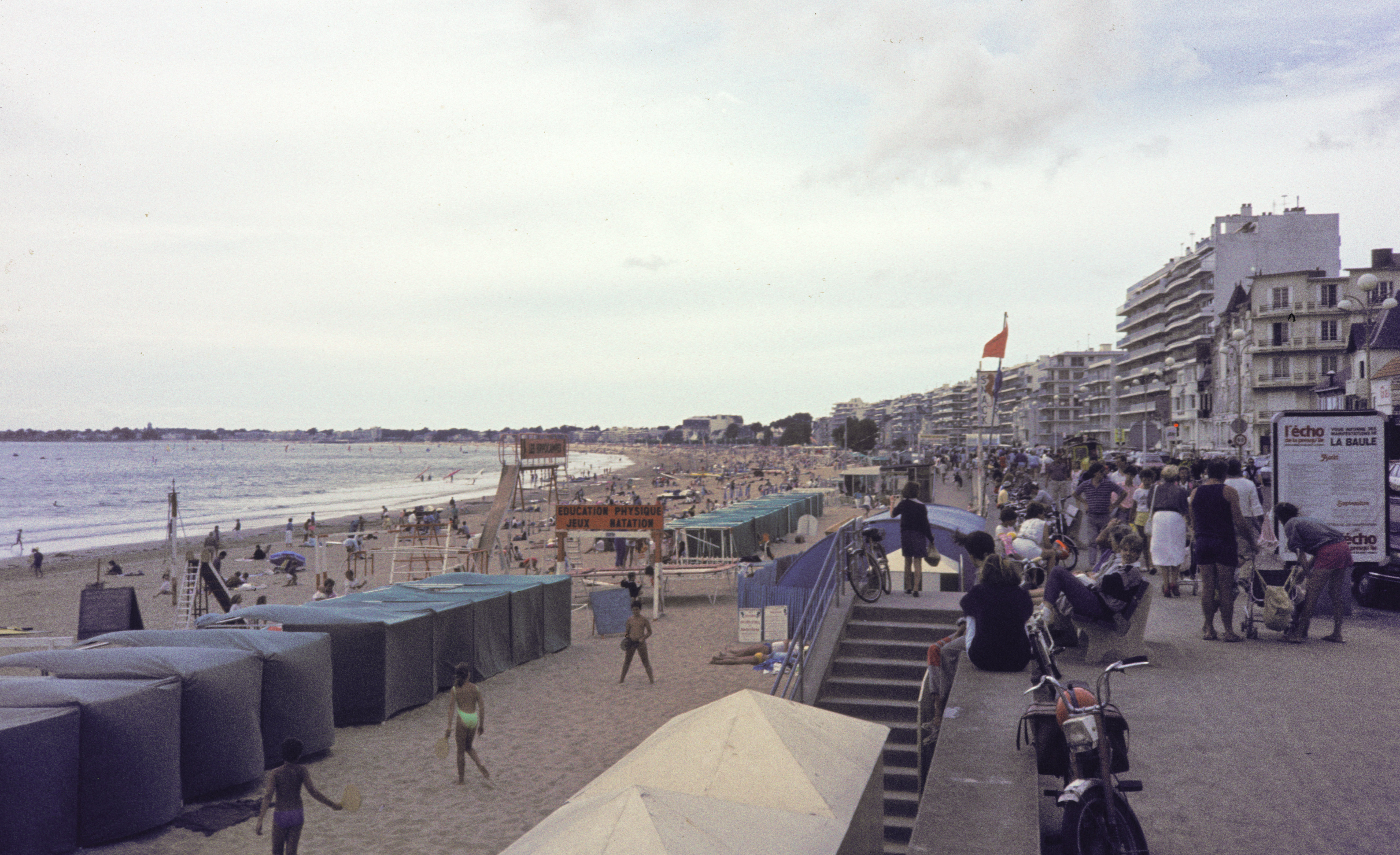 Plage de La Baule, Bretagne (France)